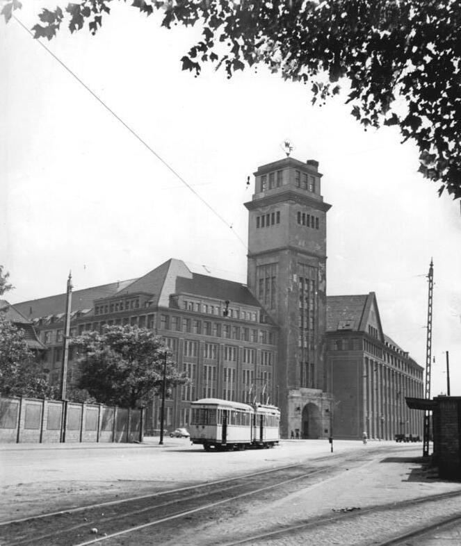 Berlin, VEB "Werk für Fernmeldewesen" Zentralbild Novak 15.8.1958 VEB "Werk für Fernmeldewesen" Berlin-Oberschöneweide, Wilhelminenstrasse 68-69 UBz-Aussenansicht des Werkes.